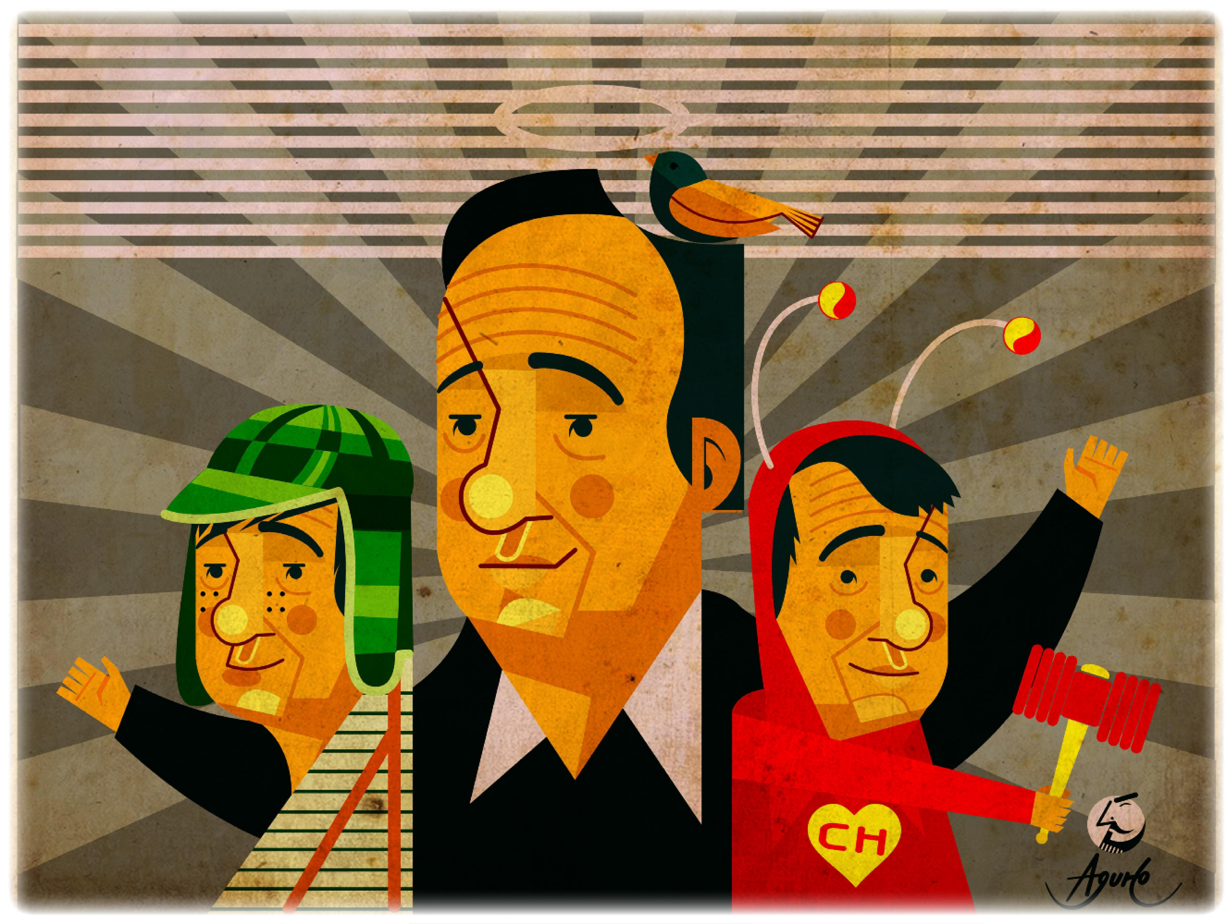 Chespirito y algunos de sus personajes